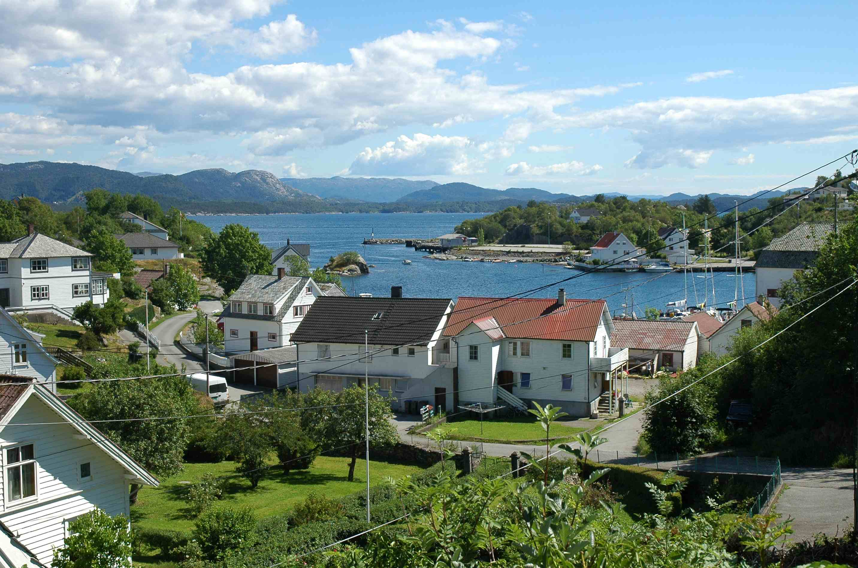 Mosterhamn ligger på øya Moster. Mosterhamn på Bømlo.